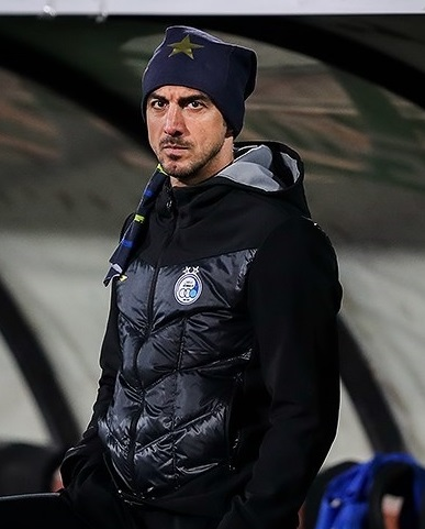 دیدار تیم‌های فوتبال استقلال تهران و نساجی مازندران